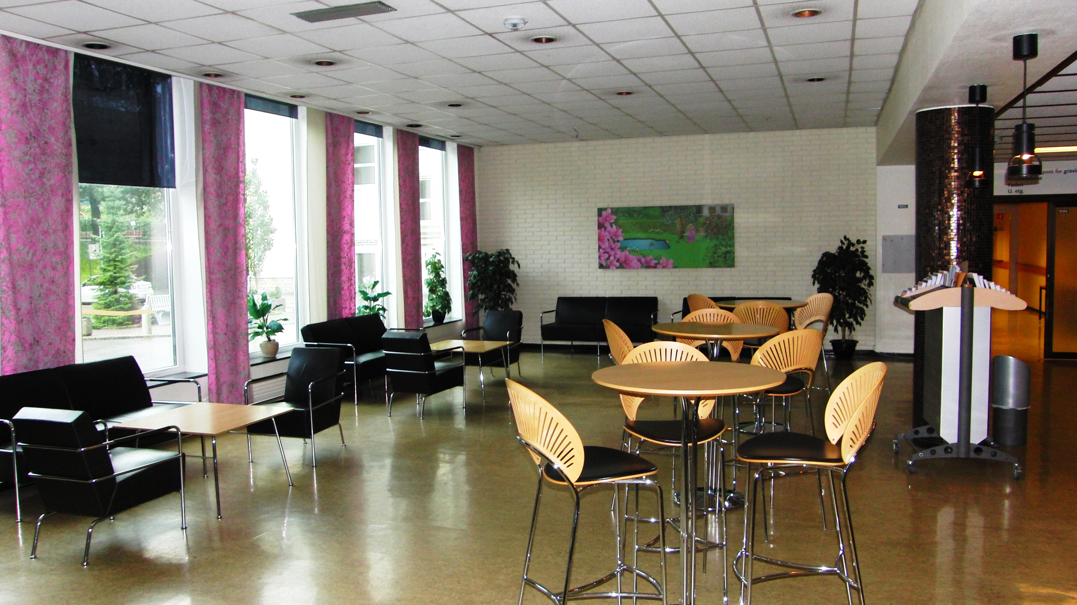 Description=Kvinneklinikken (Haukeland Universitetssykehus)